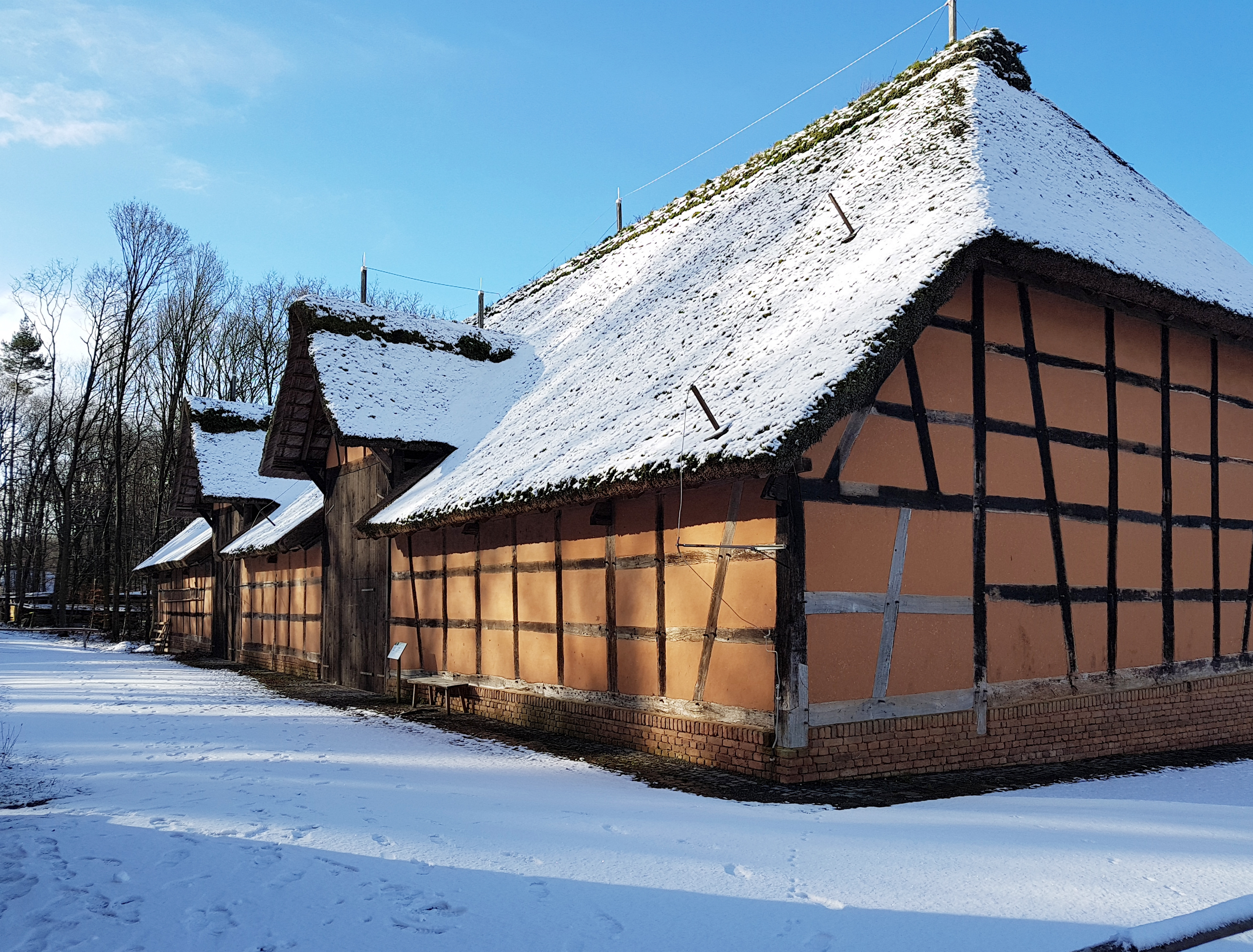 Ehemalige Dietkirchener Zehntscheune aus Sechtem im LVR-Freilichtmuseum Kommern